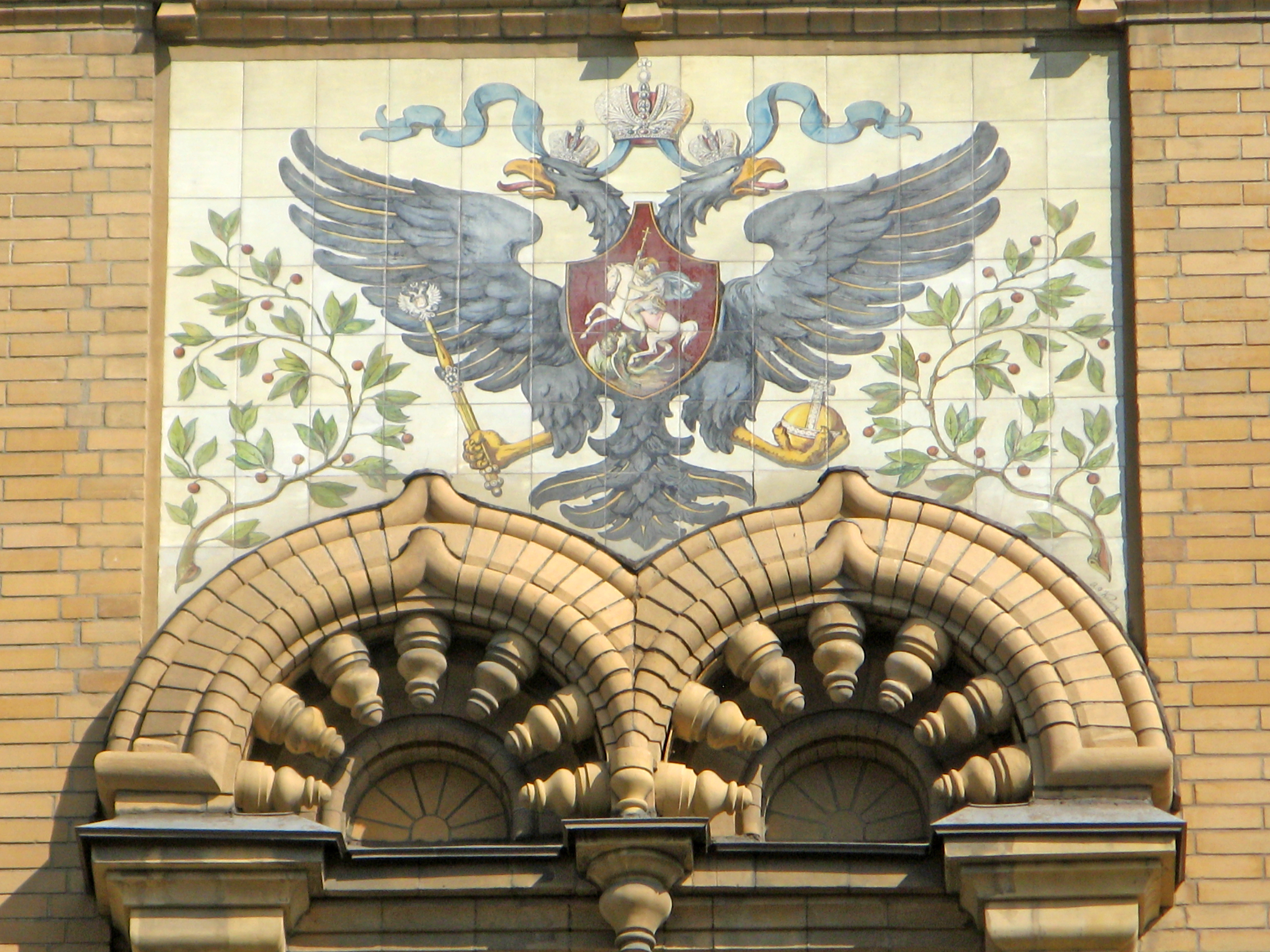 Общее Офицерское собрание Армии и Флота с дворовыми флигелями: Литейный проспект, 20, Кирочная улица, 1, Центральный район, Санкт-Петербург